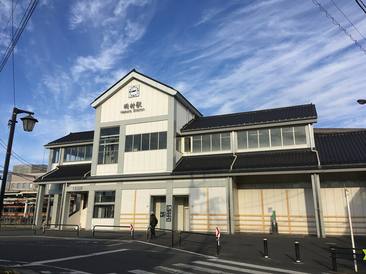 羽村駅西口